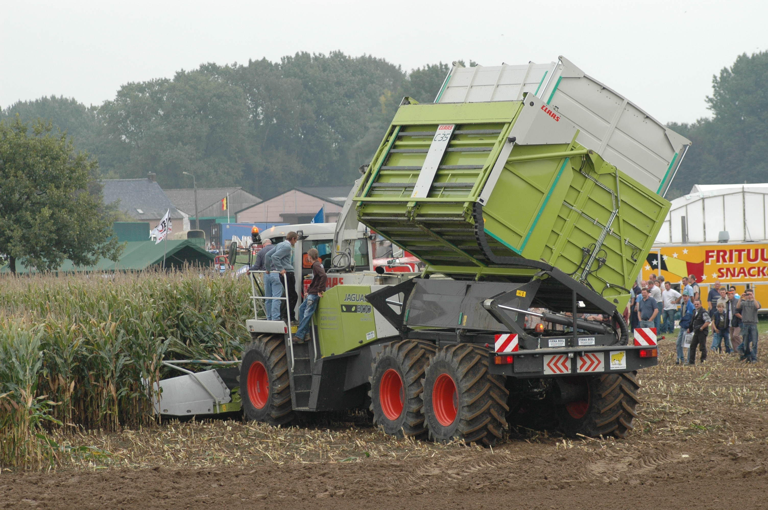 Claas Jaguar 900 mit Vorratsbunker für Non-Stop-Betrieb, Werktuigendagen 2007, Belgien